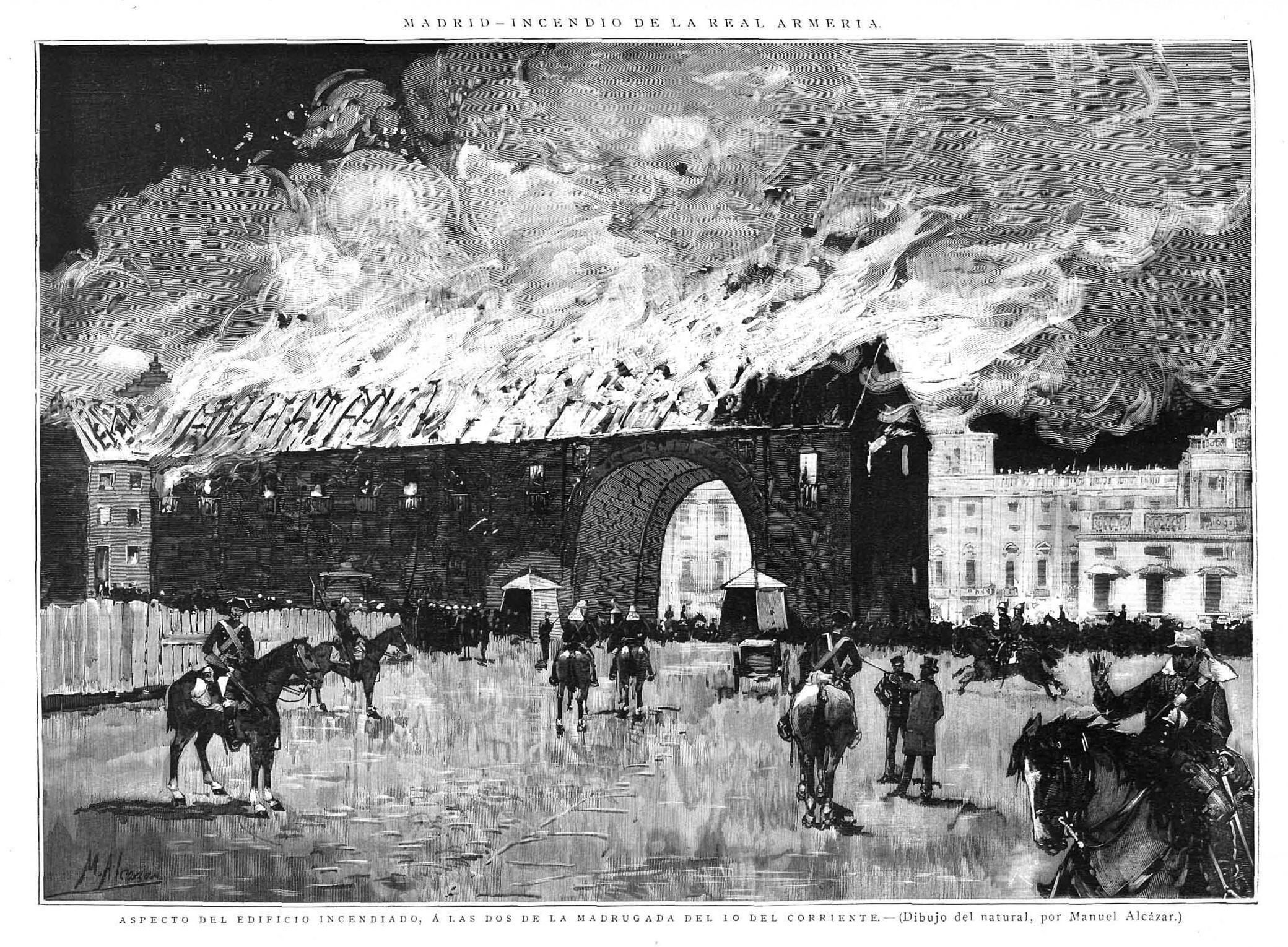 Madrid. — Incendio de la Real Armería. Aspecto del edificio incendiado, a las dos de la madrugada del 10 del corriente, en la revista española La Ilustración Española y Americana.